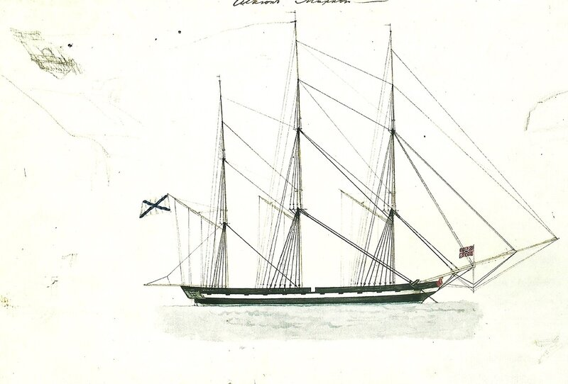 Михайлов Павел Николаевич - Шлюп Мирный